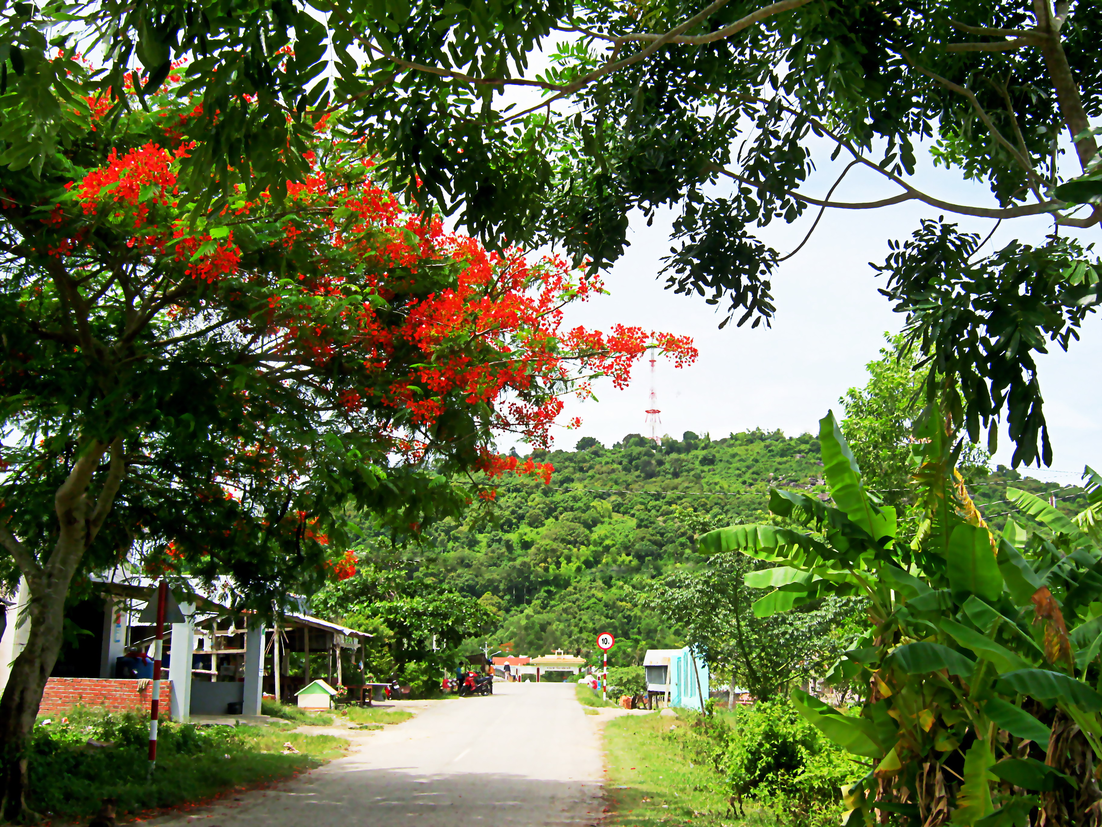 Đường dẫn vào xã Thổ Sơn, thuộc huyện Hòn Đất, tỉnh Kiên Giang, Việt Nam. Hòn trong ảnh là Hòn Me.